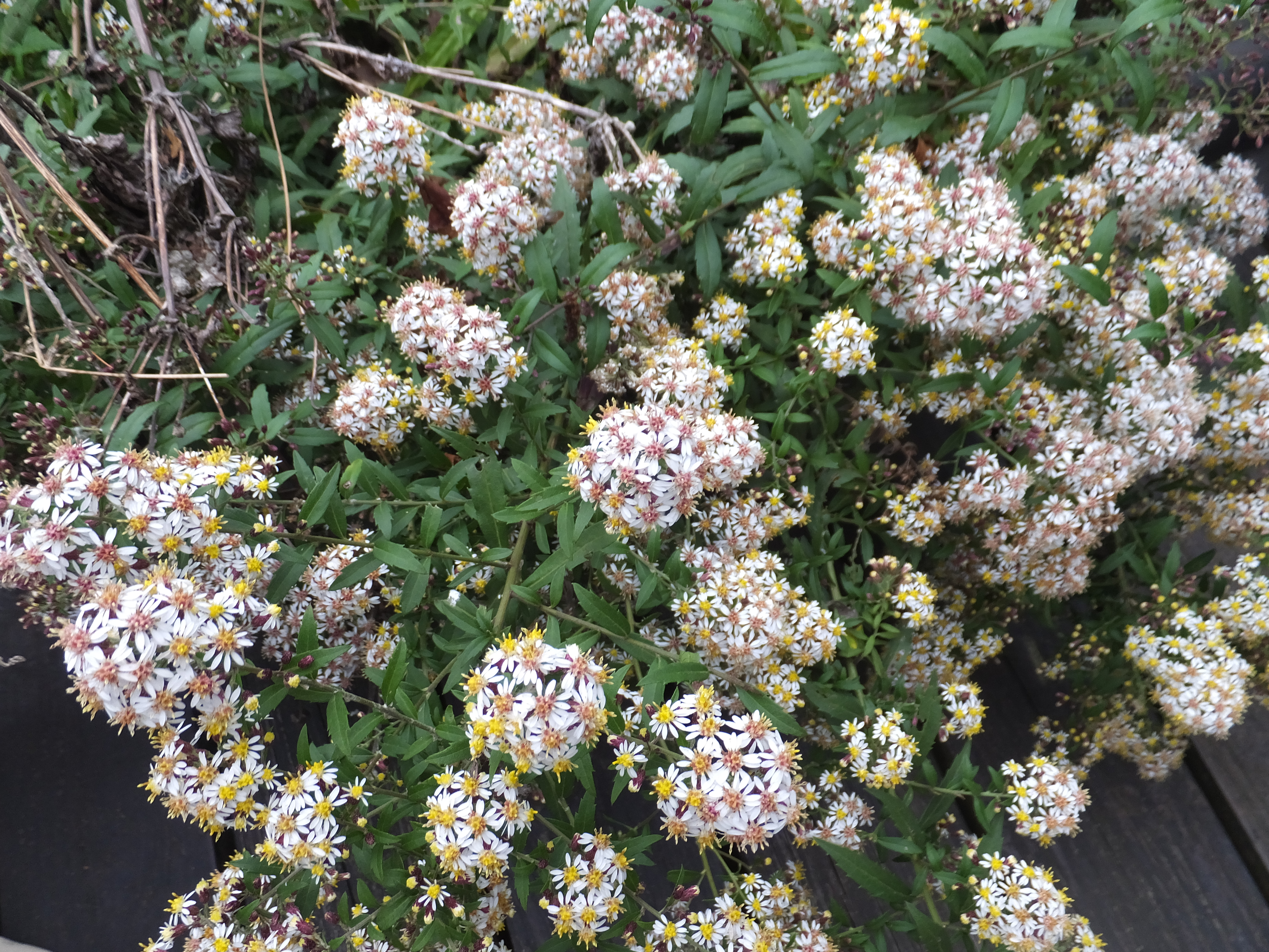 台灣馬蘭 Aster taiwanensis Kitam.